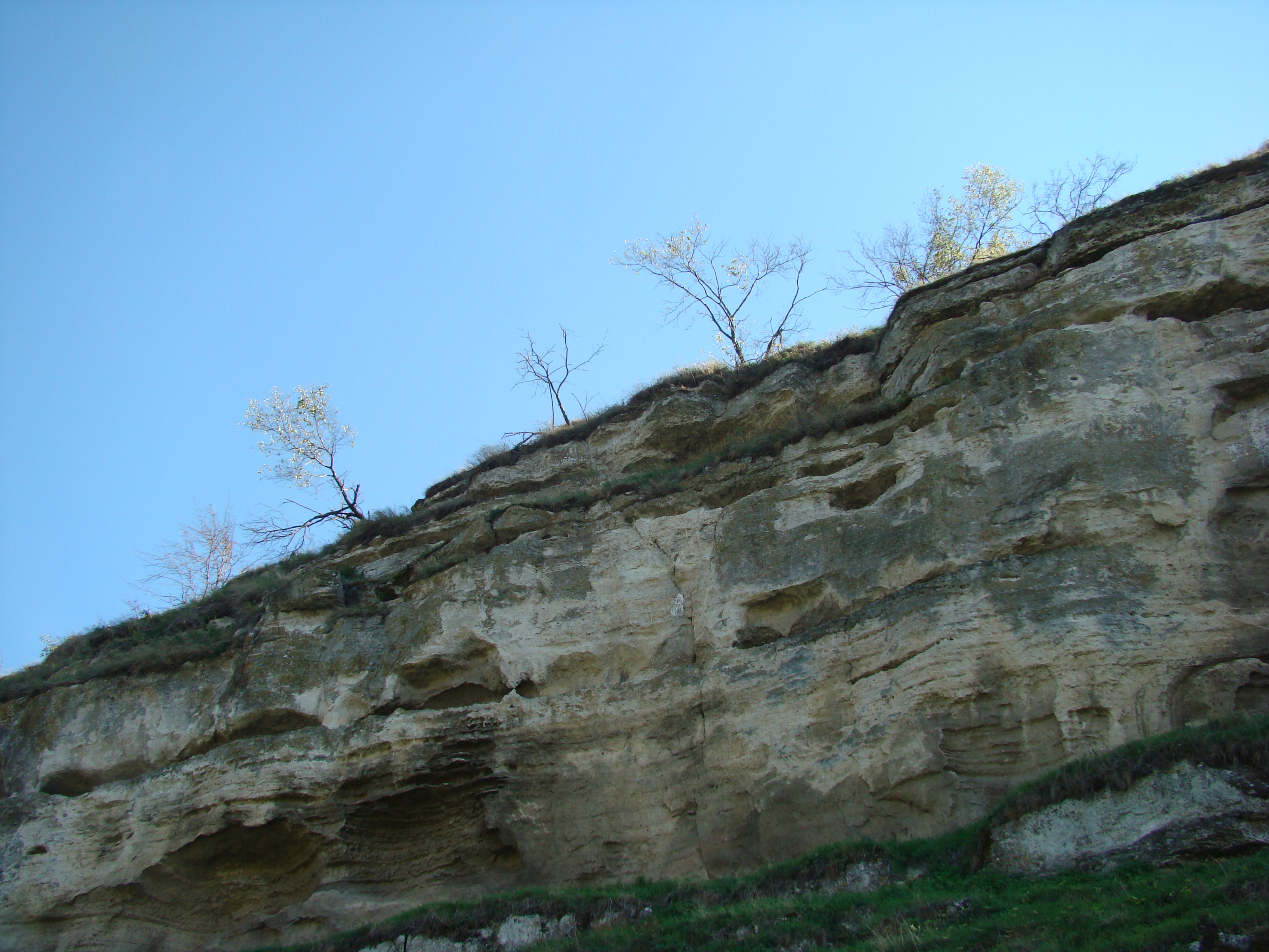 River Raut 014